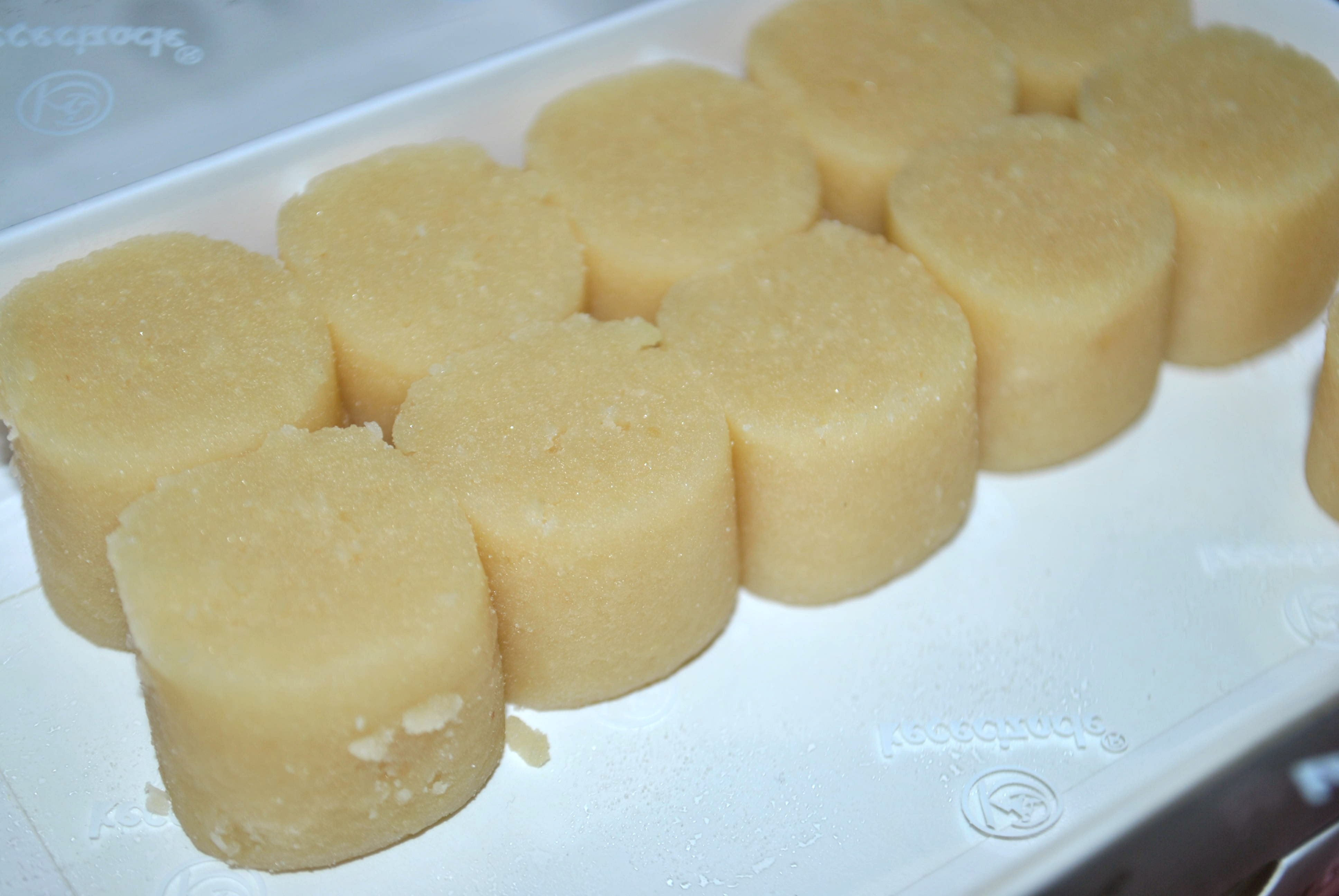 Türk mutfağının tatlılarından badem ezmesi